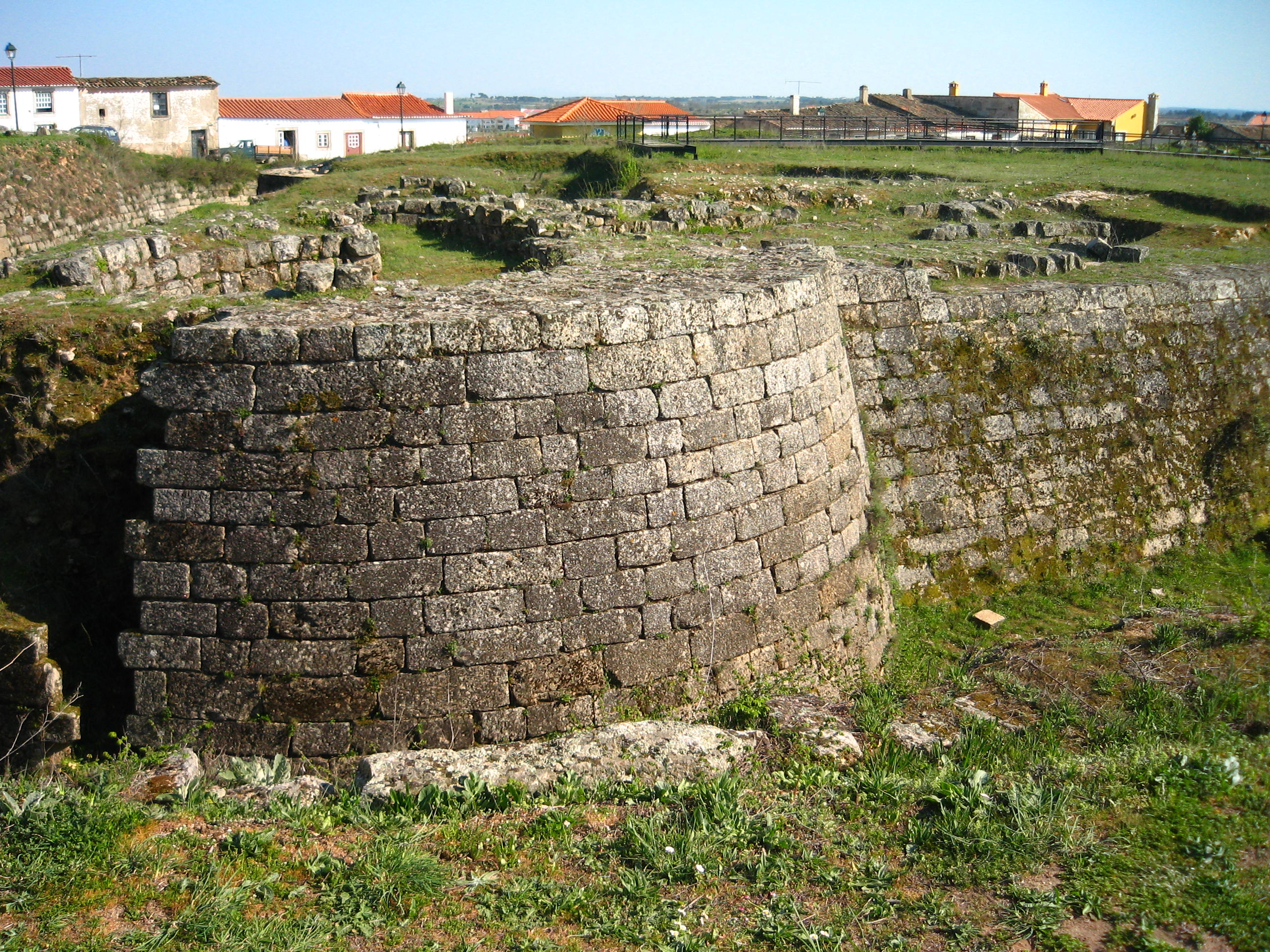 Ruínas do Velho Castelo Medieval de Almeida.Destruido pela explosão do paiol de pólvora sob o fogo de artilharia francesa.Distrito da Guarda. This file was uploaded for Wiki Loves Monuments in Portugal with the unique identifier 70693.